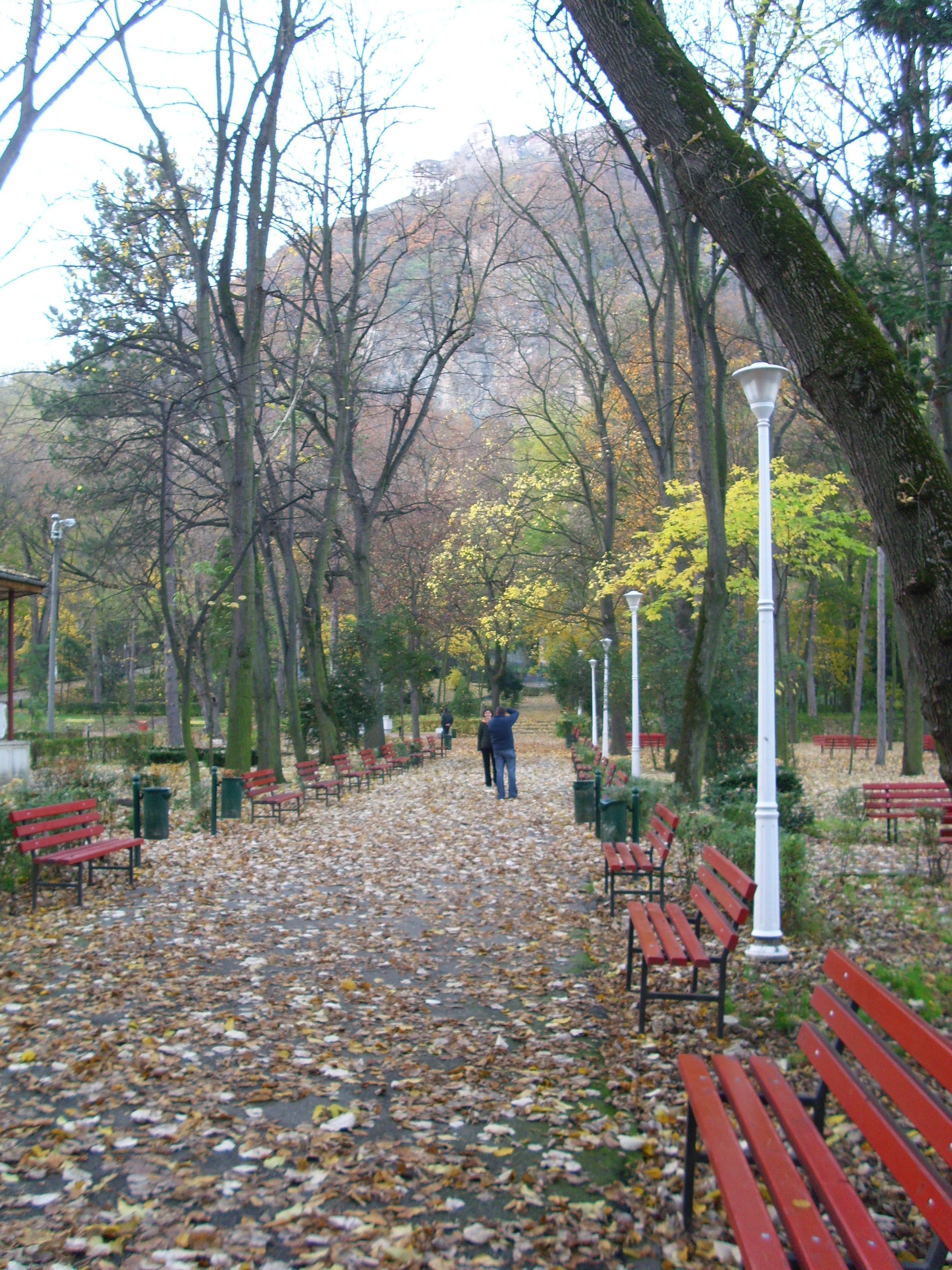 Alee din Parcul Cetatii Deva in plina toamna